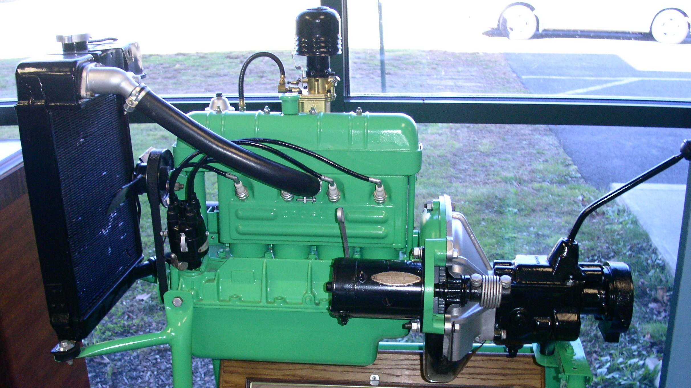 Crosley cobra engine